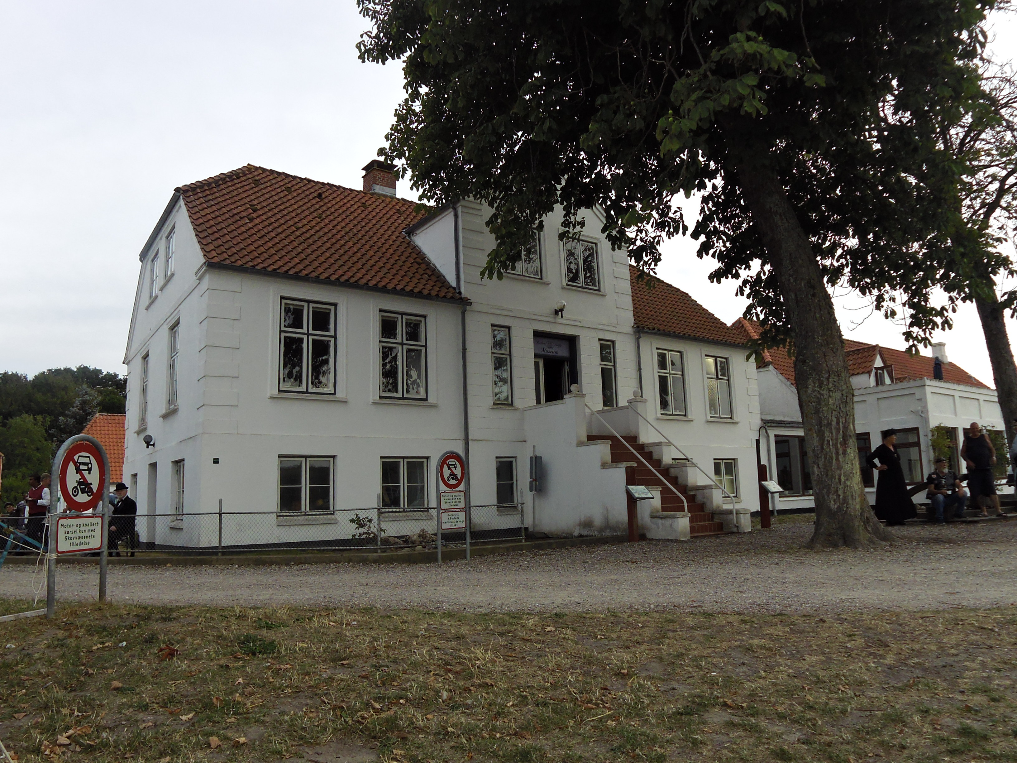 Kalvø Værftsmuseum